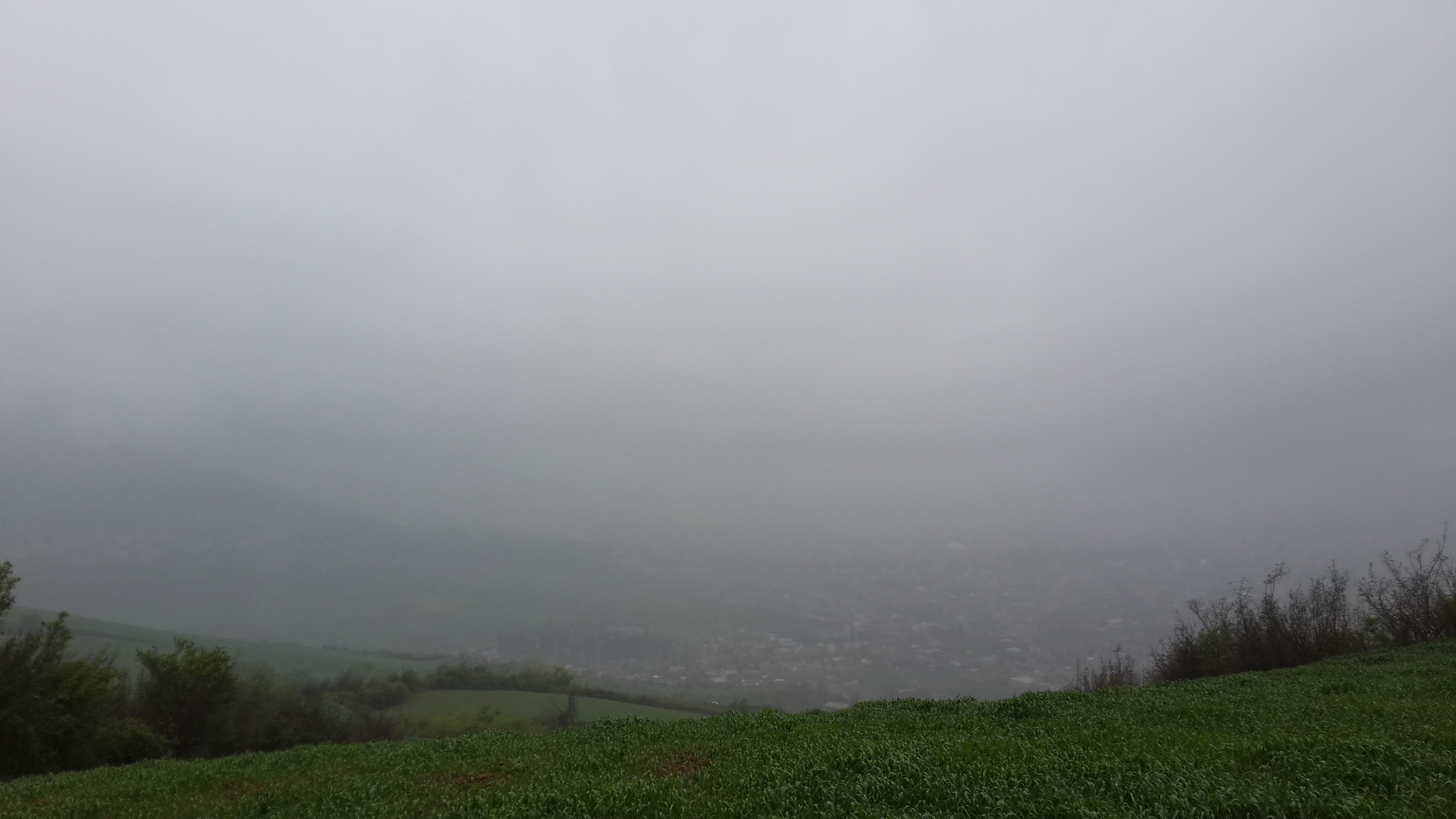 یکی از جا های دیدنی شهرستان مینودشت.